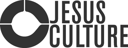 Логотип Jesus Culture